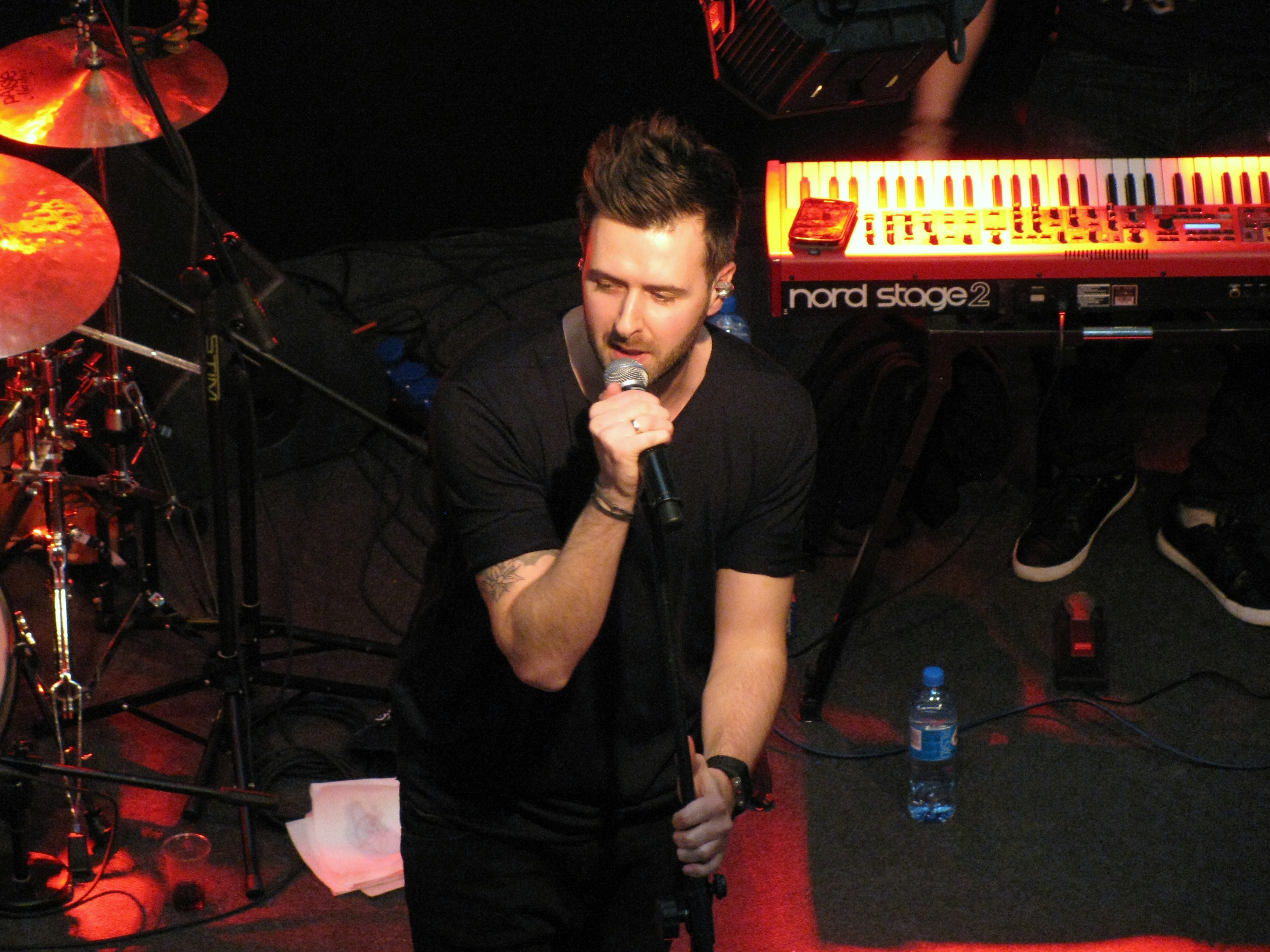 Grzegorz Hyży, koncert w Rumi.